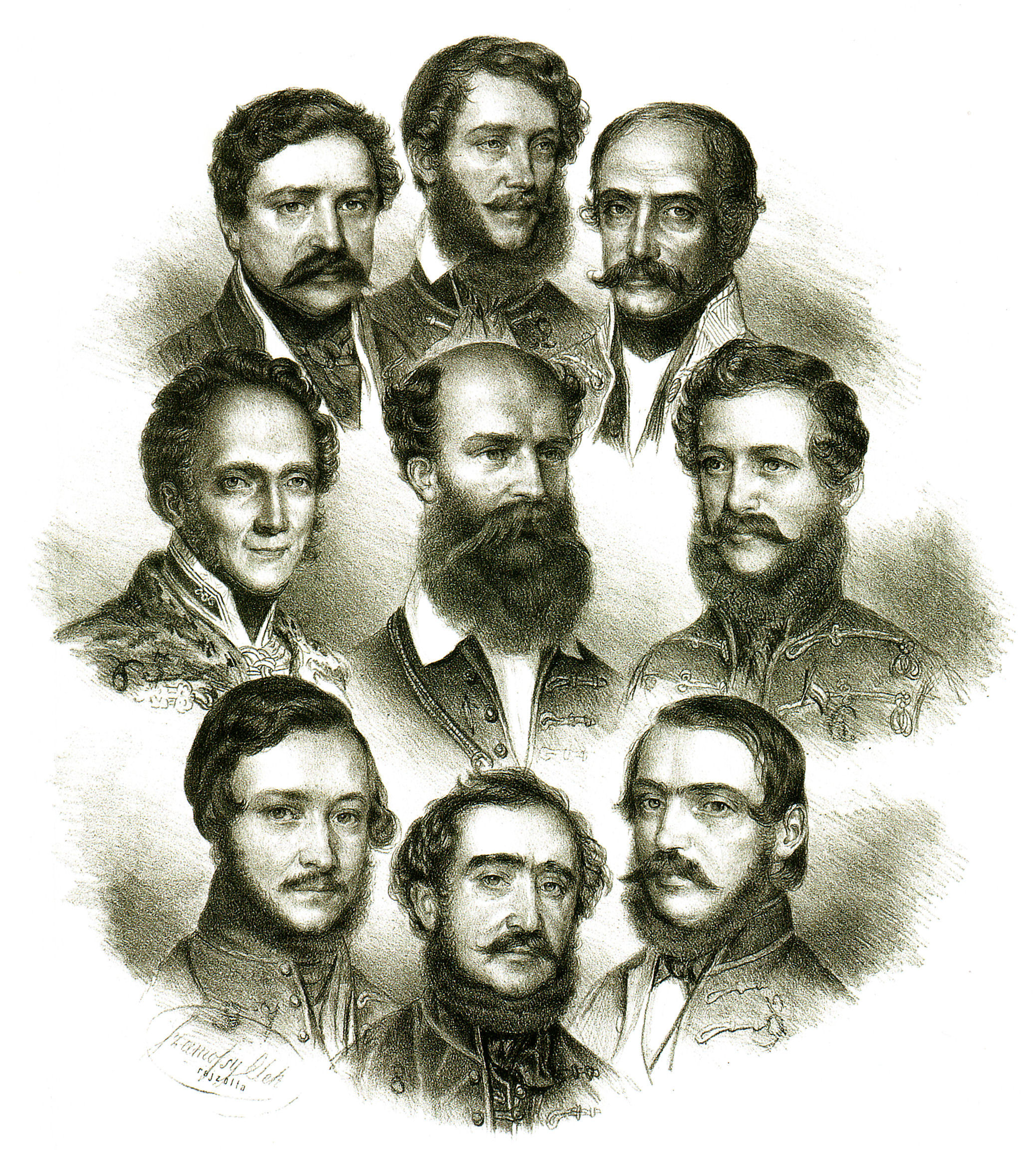 A Batthyány-kormány csoportképe. Szamossy Elek litográfiája. Deák Ferenc igazságügyminiszter, Kossuth Lajos pénzügyminiszter, Mészáros Lázár hadügyminiszter, Eszterházy Pál a közös ügyek minisztere, Batthyány Lajos miniszterelnök, Szemere Bertalan belügyminiszter, Eötvös József vallás és közoktatásügyi miniszter, Széchenyi István közlekedésügyi miniszter, Klauzál Gábor földművelés-, ipar- és kereskedelemügyi miniszter